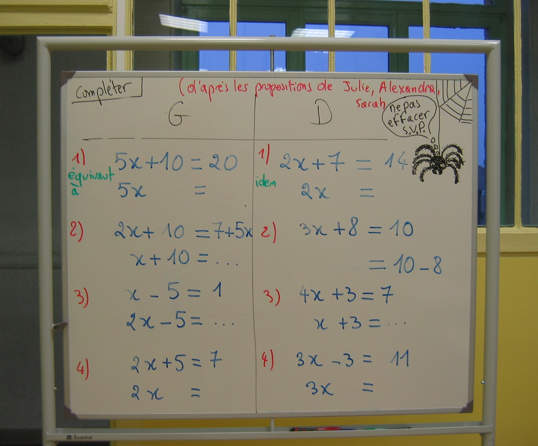 Contrôle travaux numériques Niveau 5èmes - sur la base de propositions d'élèves - Jarny France